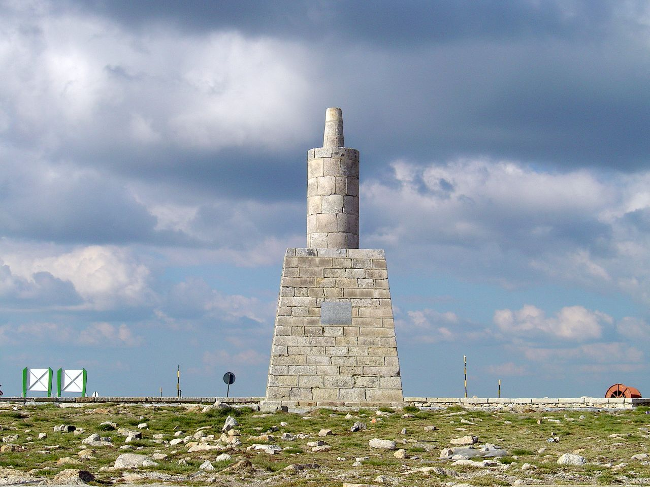 O ponto mais alto de Portugal Continental (1993m). Panoramas 360º da Serra da Estrela